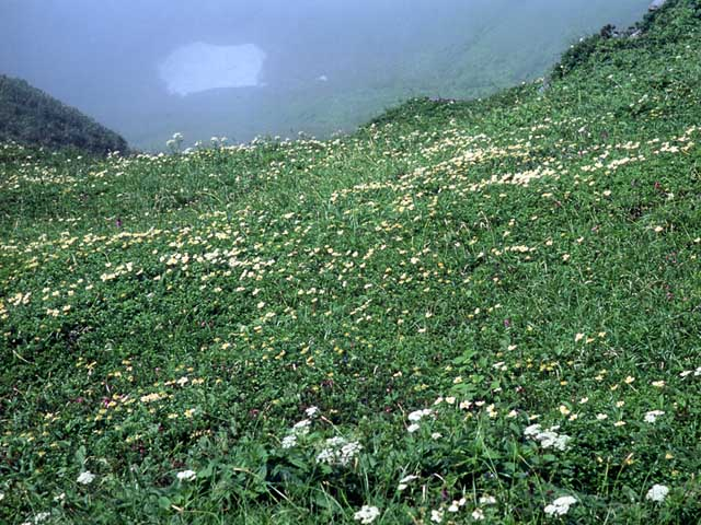 Flores alpinas en Furano-dake, centro de Hokkaido. Julio, 2006. foto por usario Inti-sol. 富良野岳山頂部の御花畑。2006年7月、投稿者自身の撮影。